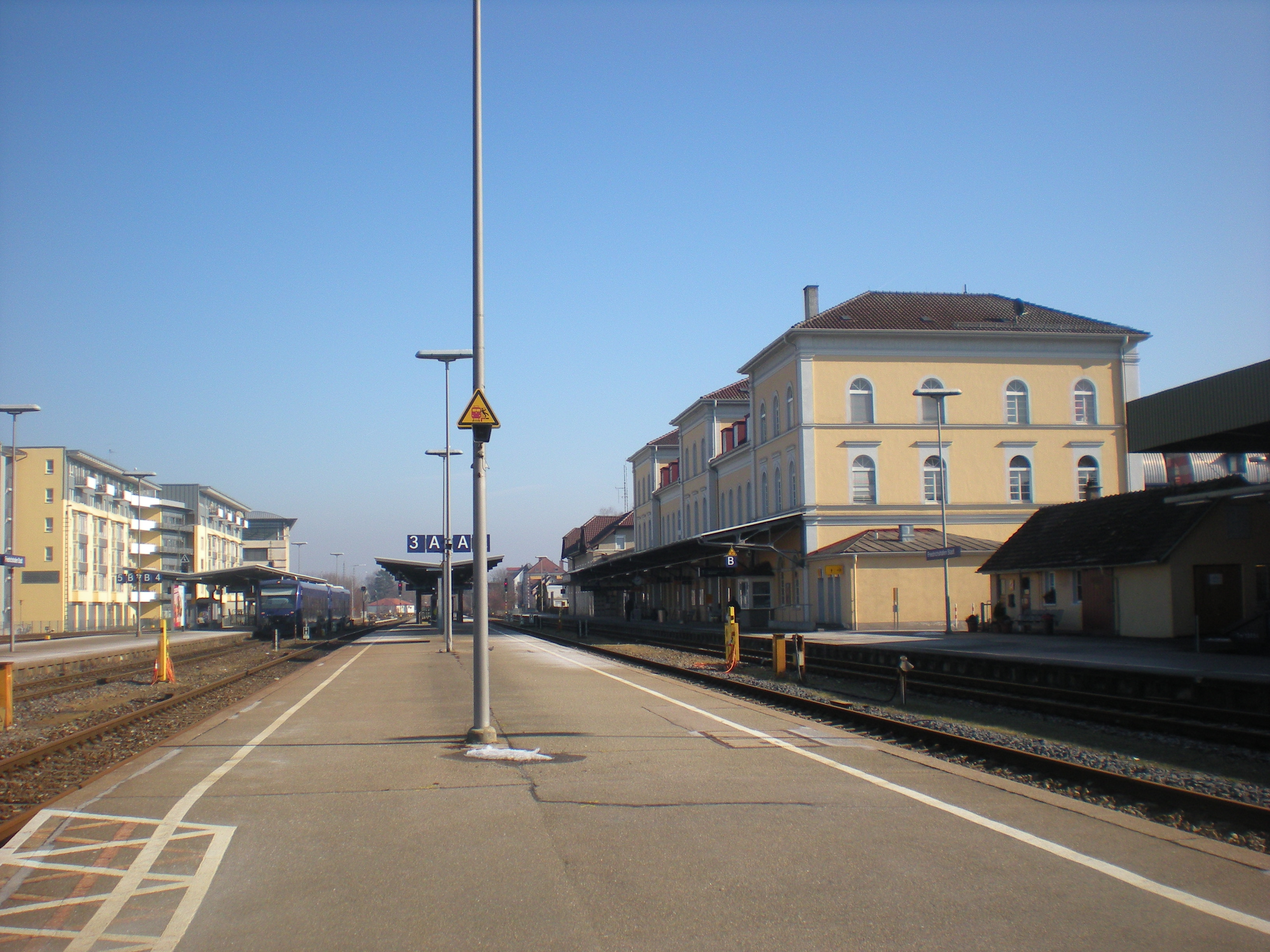 Bahnsteige und Bahnhofsgebäude des Bahnhofs Friedrichshafen Stadt